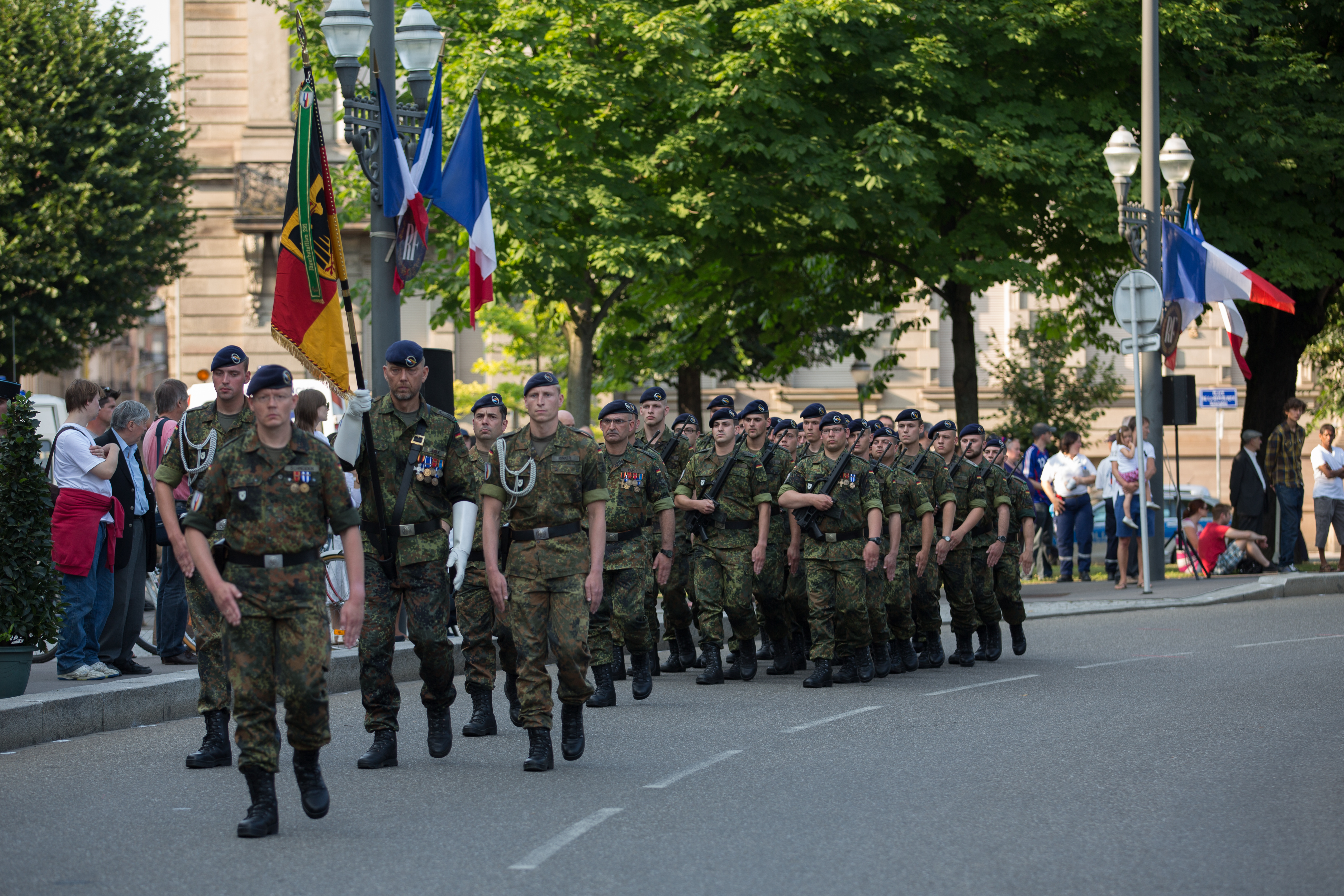 Détachement du 291e Jägerbataillon de la Brigade Franco-Allemande à Strasbourg place de la République lors du défilé du 13 juillet 2013.